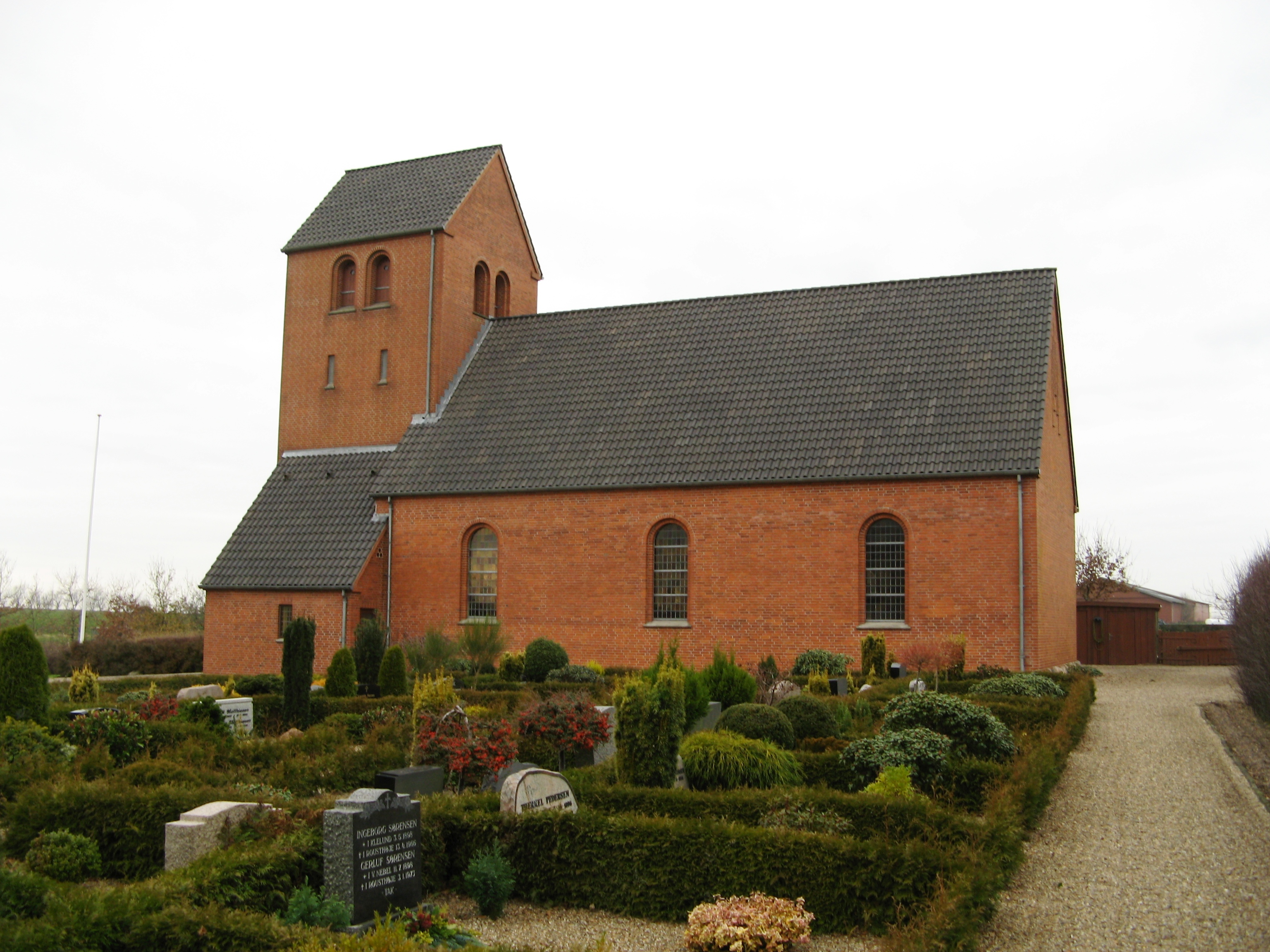 Rousthøje kirke, Rousthøje sogn, Varde kommune (former: Skads Herred, Ribe Amt). Kirken set fra sydøst